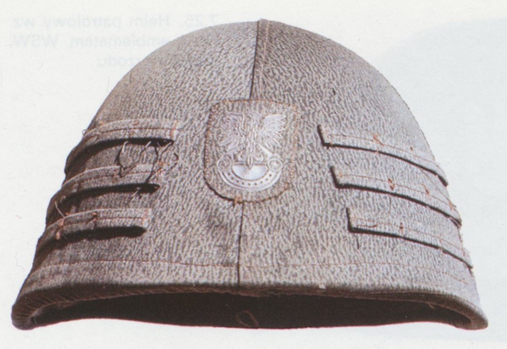 Hełm polski wz. 50 w pokrowcu w kamuflażu "Moro"